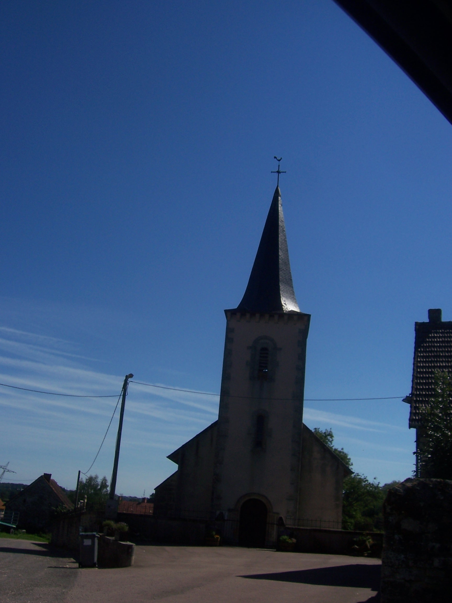 Eglise de Saint-Martin-de-Commune